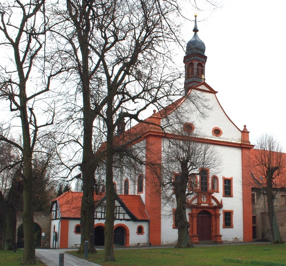 Worbis, katholische Kirche St. Antonius